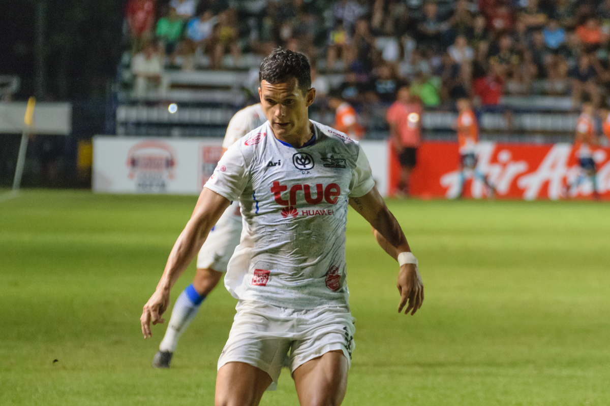 Mika Chunuonsee